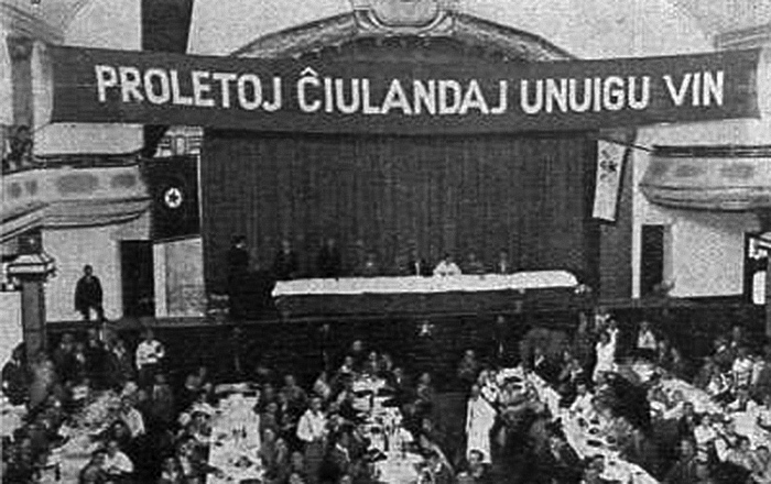 9a SAT-kongreso en Leipzig, 4-10 de aŭgusto 1929. Festsaal (festa salono) en Volkshaus.